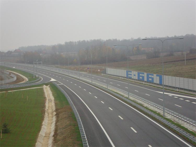 Autoput BL-Gradiška u okolici GD